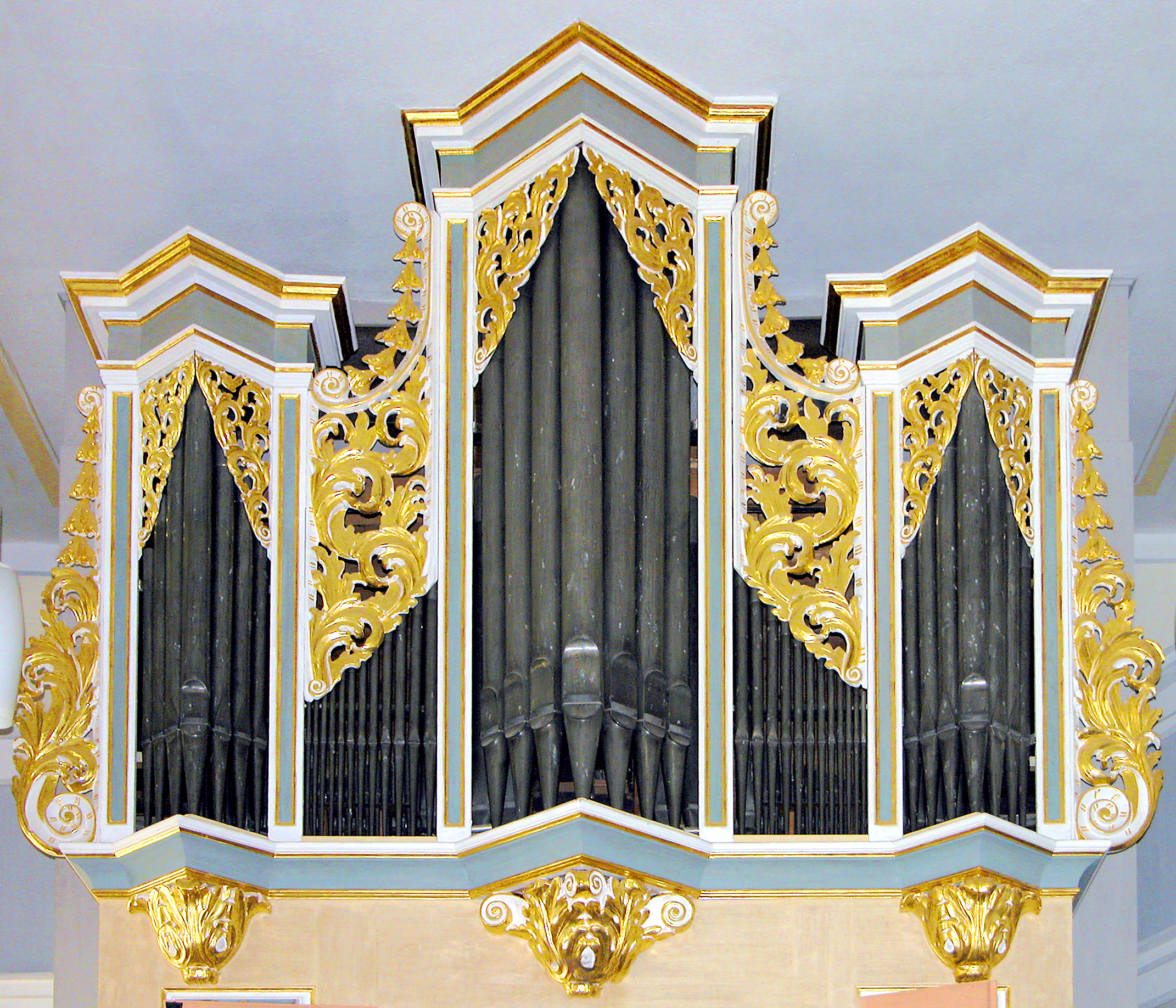 02.09.2011 09600 Niederschöna (Halsbrücke), Schulgasse (GMP: 50.966258,13.422008): St. Annen, Dorfkirche Niederschöna. Die heutige barocke Saalkirche entstand bei einem Umbau in den Jahren 1754/1755. Bereits 1626 erhielt die Kirche eine Orgel, gebaut von Christoph Löwe, die offensichtlich um 1715 nicht mehr den Ansprüchen genügte. So wurde durch Einflussnahme Martin Alberts, damaliger Erb-, Lehn- und Gerichtsherr hier und Bürgermeister von Freiberg, Gottfried Silbermann mit der Errichtung einer neuen Orgel beauftragt. Am 22. November 1716 wird auf ihr erstmals gespielt. 1754/1755 wird sie von der Nordseite auf die Westseite versetzt. Am 8. Juli 1876 wird die Orgel durch Blitzeinschlag beschädigt. Reparatur durch Hoforgelbaumeister Jehmlich, Dresden. Das Gehäuse der Orgel wurde neu gestrichen und vergoldet. 1993 Restaurierung des Orgelprospekts. Von September 2015 bis Mai 2016 erfolgte eine umfangreiche Restaurierung durch die Orgelwerkstatt Wegscheider. [DSCNn2655.TIF]20110902035DR.JPG(c)Blobelt